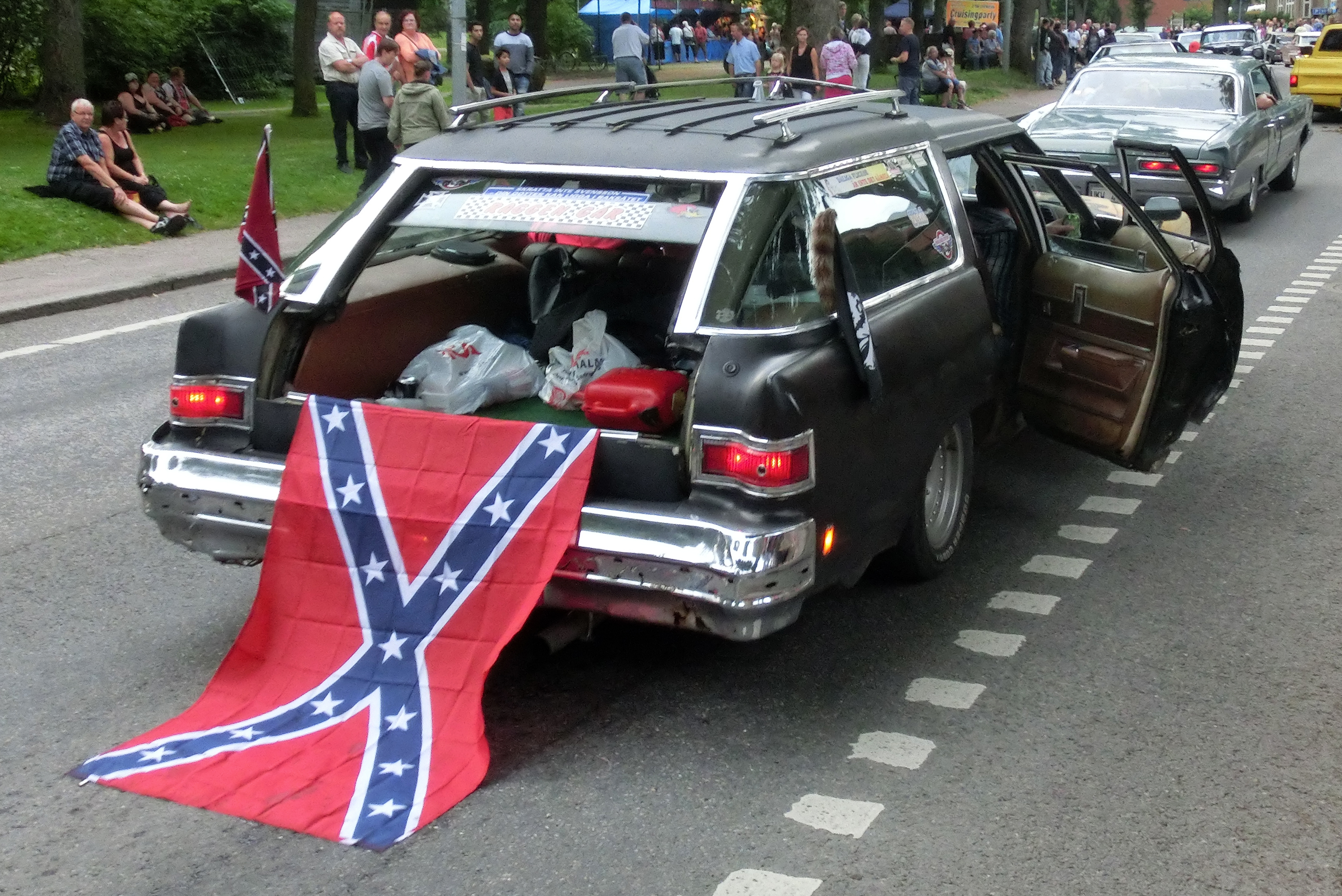 En svart Buick Estate Wagon 1975 med sydstatsflagga på cruising i Falköping 2013-07-27. Bilen saknar baklucka så man ser två kassar med öl och en bensindunk i bagageutrymmet. Från öppningen hänger sydstatsflaggan, som släpar i asfalten. På bilens vänstra sida sitter ytterligare en sydstatsflagga, medan det på högra sidan sitter en piratflagga och en tvättbjörnsvans. Uppe till vänster på den minimala bakrutan ses Järnkorset.